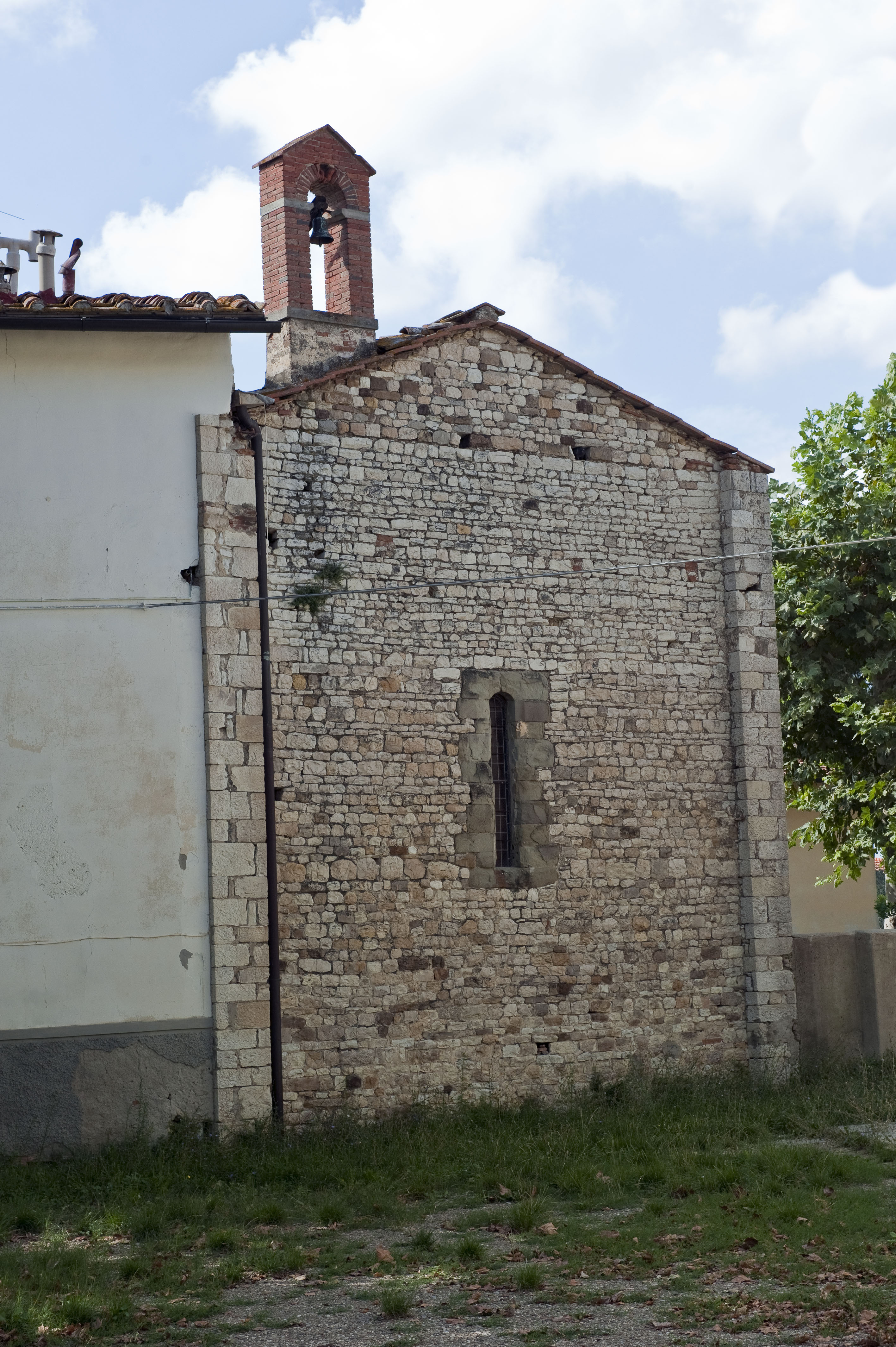 Fronte posteriore dell'Oratorio della Santa Croce a Varliano (Bagno a Ripoli)